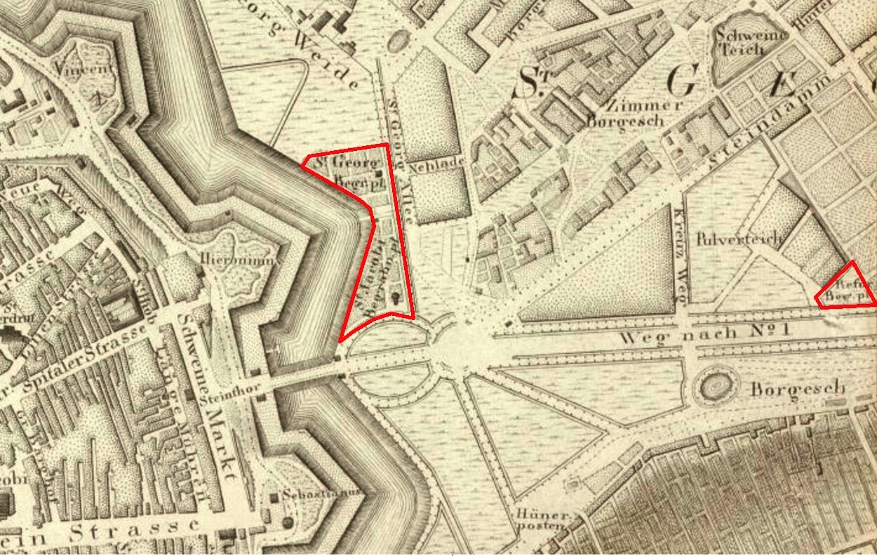 Die ehemaligen Steintorfriedhöfe in Hamburg, Ausschnitt aus dem Plan "Hamburg und seine nächsten Umgebungen im Jahre 1810". Die Begräbnisplätze von St. Georg und St. Jacobi mussten Ende des 19. Jahrhunderts dem Neubau des Hamburger Hauptbahnhofes weichen und wurden durch den neuen Jacobifriedhof in Hamburg-Eilbek sowie vor allem durch den Hauptfriedhof Ohlsdorf ersetzt. Am rechten Bildrand der ehem. Begräbnisplatz der Reformierten Gemeinde Hamburgs.